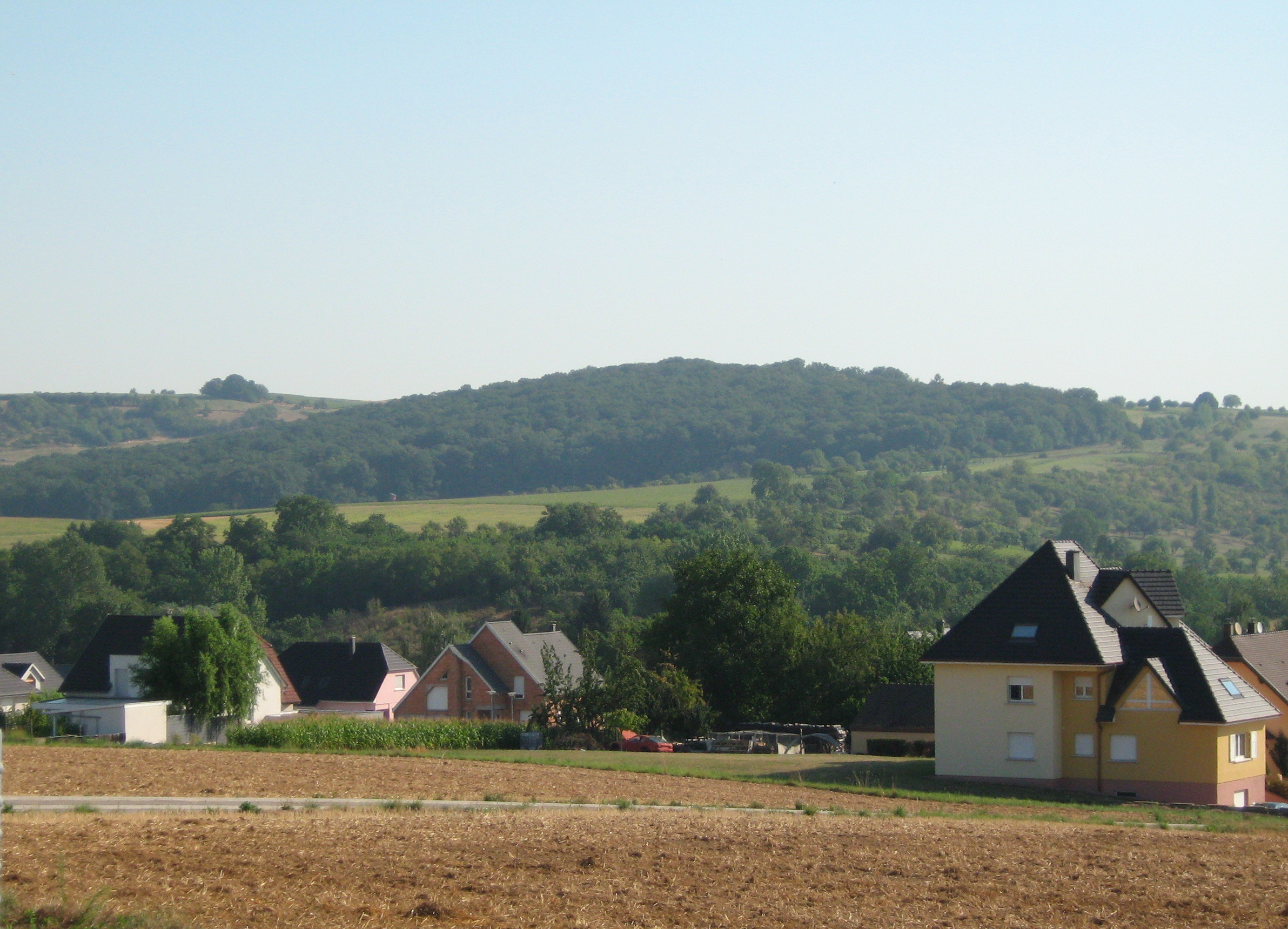 Vue sur la forêt d'Alteckendorf - Alsace